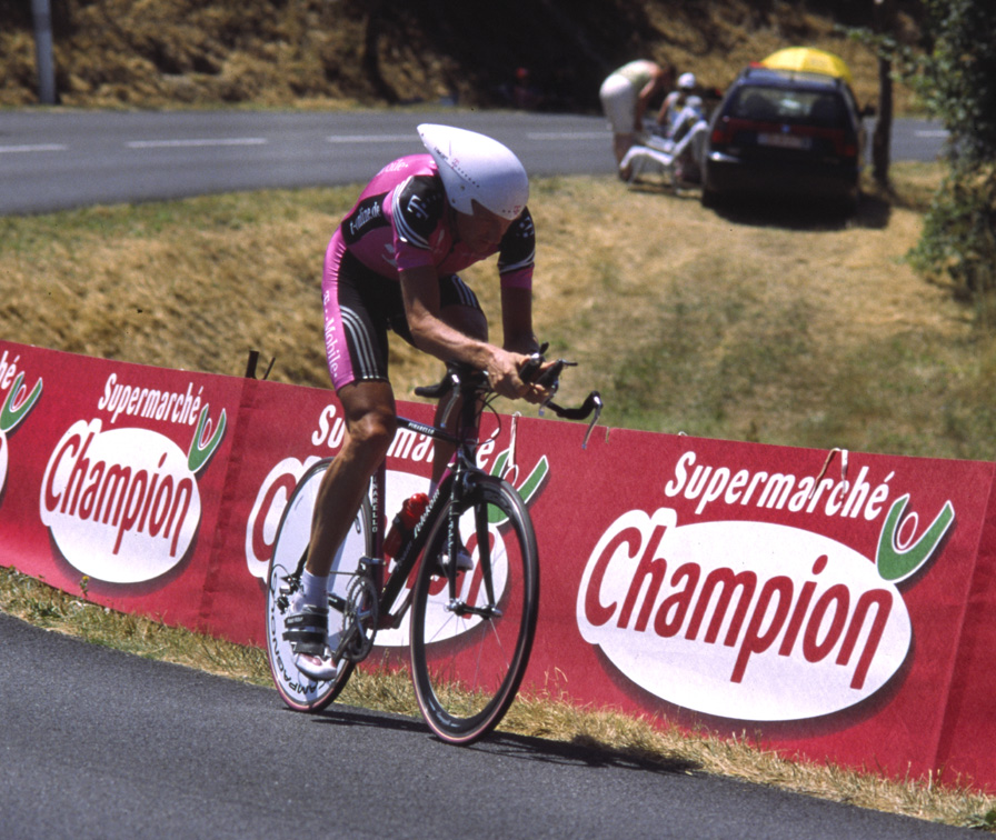 Rolf Aldag Tour de France 2003, individual time trial/contre-la-montre/Zeitfahren Gaillac